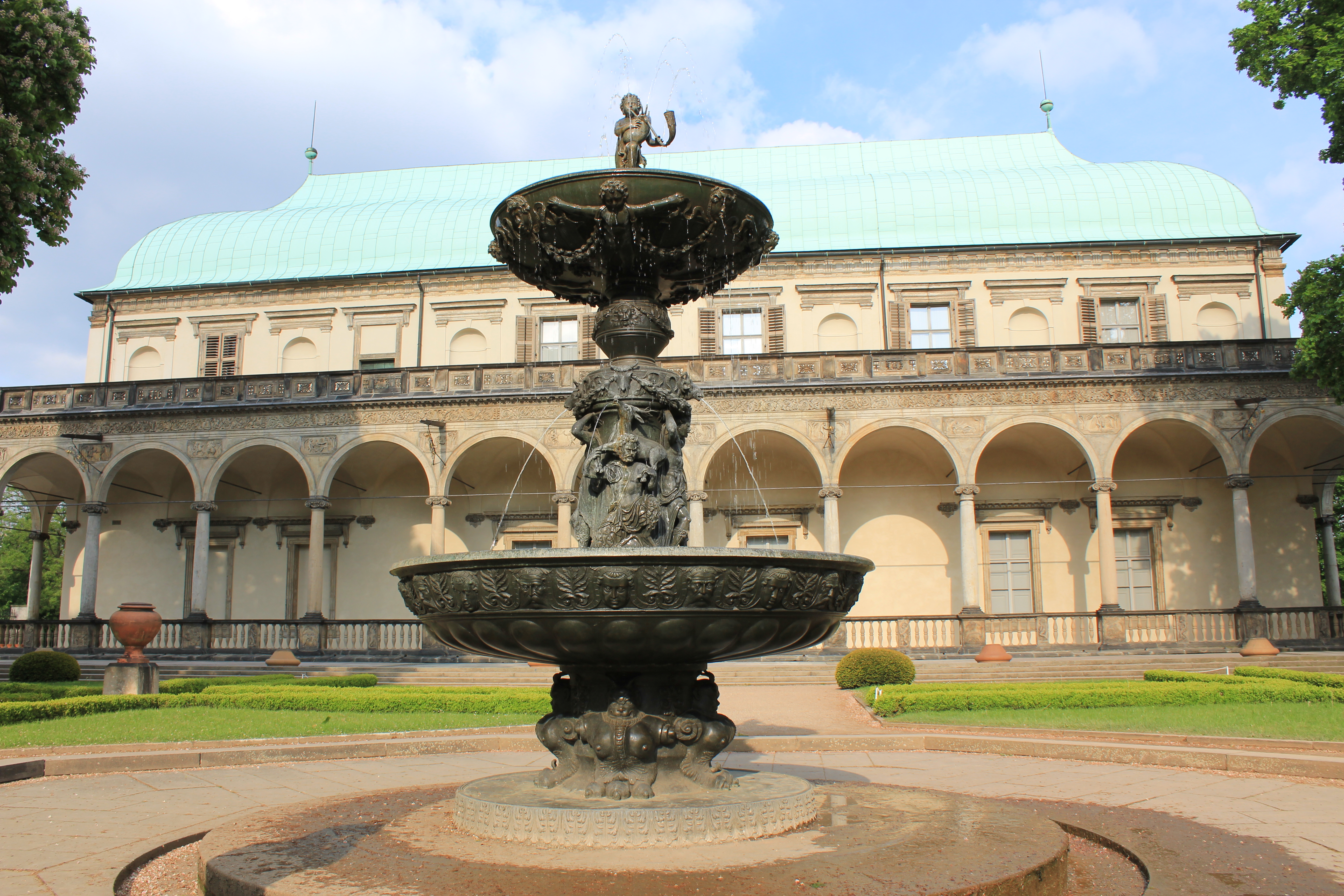 Den syngende fontene ved Belvedere